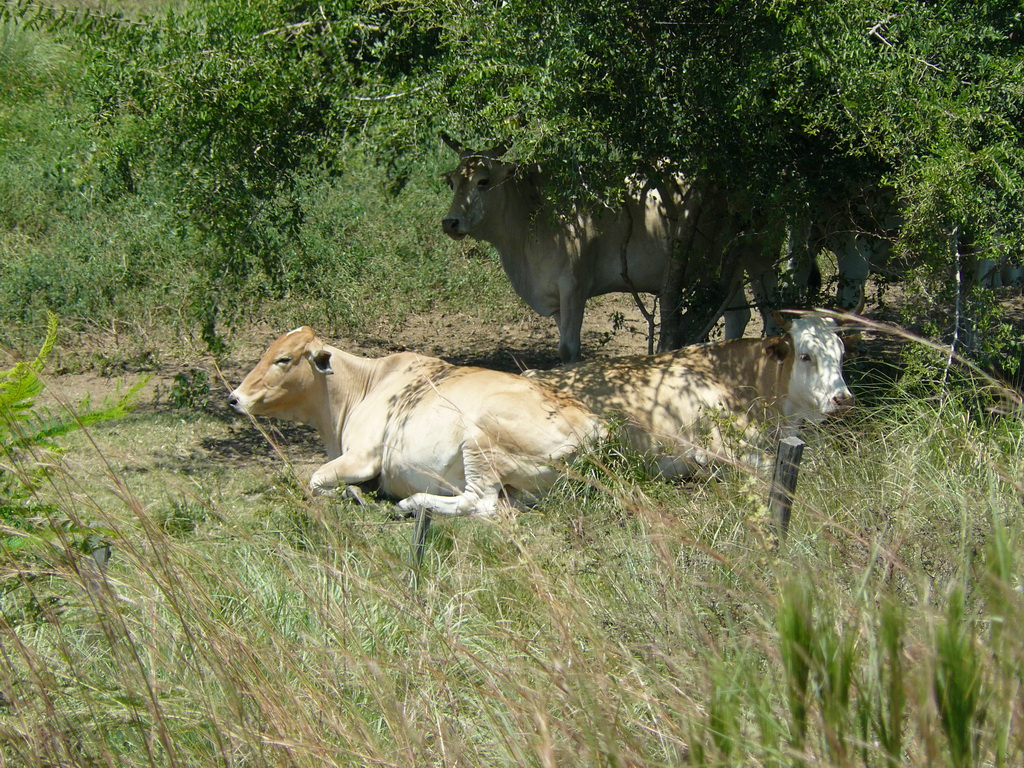 Vacas y caballos